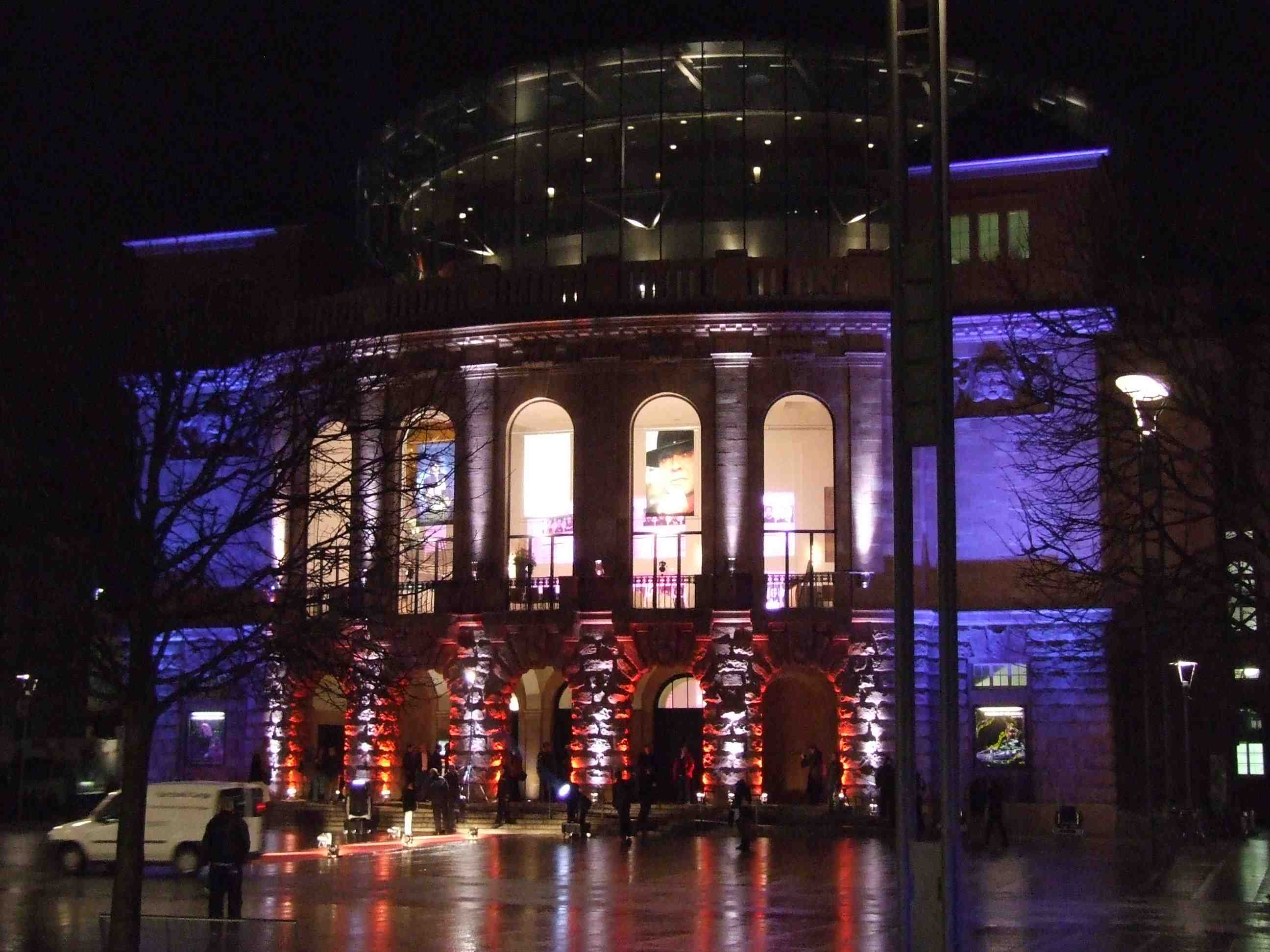 Staatstheater in Mainz am Abend der Verleihung der Carl-Zuckmayer-Medaille an Udo Lindenberg am 18. Januar 2007